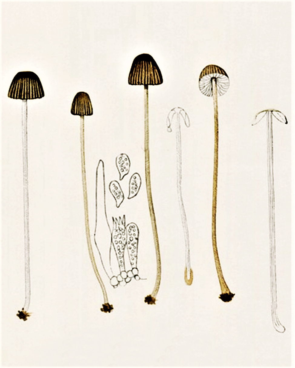 Giacomo Bresadola: Mycena galopus (galopoda) (Pers., 1800) P.Kumm. (1871)